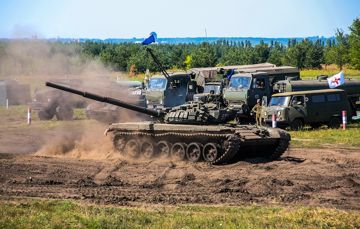 Стрельбы танков Т-72Б 3-й мотострелковой дивизии на полигоне Погоново.